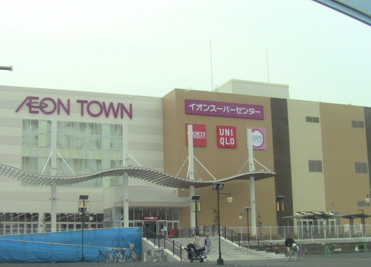 イオンタウン釜石大町出入り口側から撮影